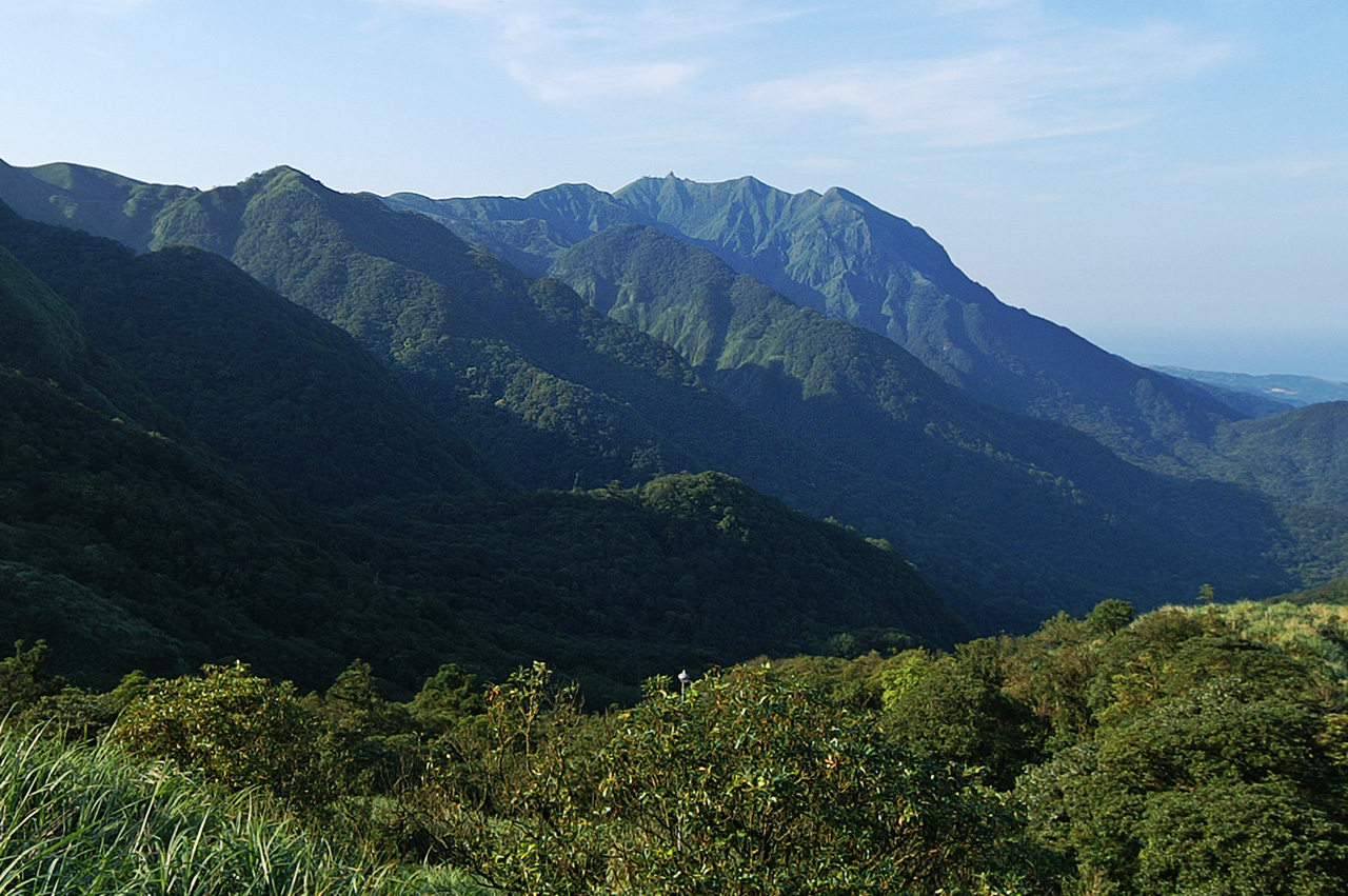 竹子山。自陽金公路遠望